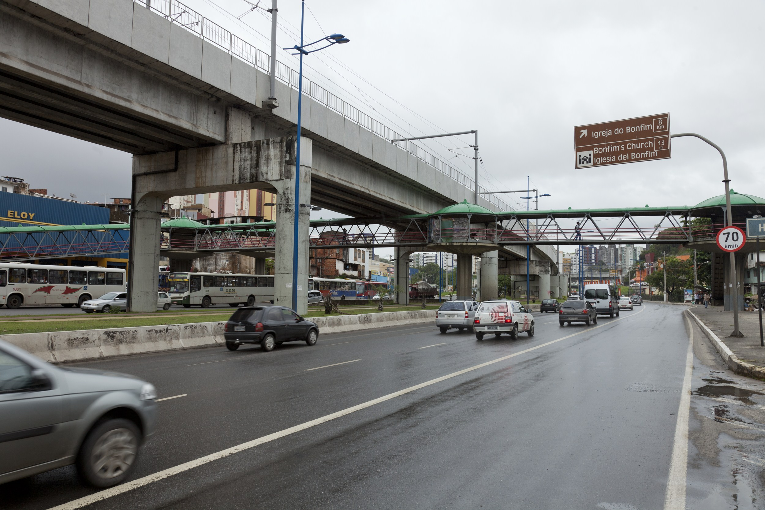 Avenida Bonocô, em Salvador.